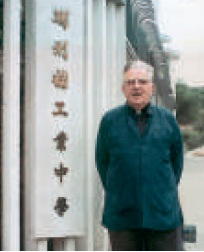 涂挽靈神父在瑪利諾工業學校(瑪利諾中學)前留影